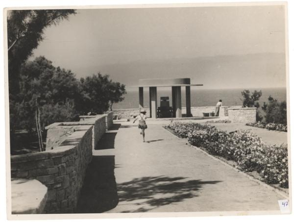 פינת האוהבים בגן המלך